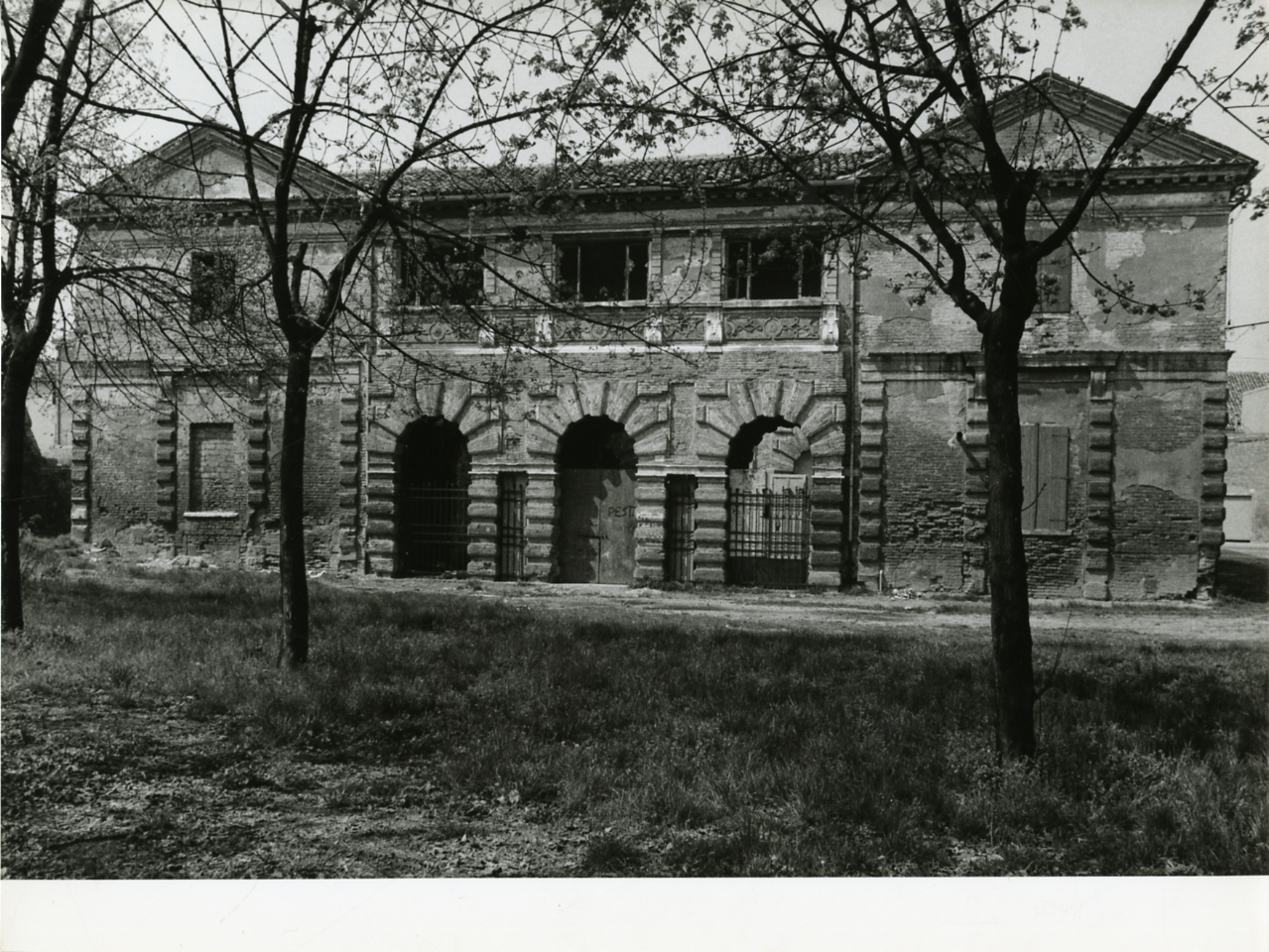 Servizio fotografico : Ferrara, 1969 / Paolo Monti. - Stampe: 2 : Positivo b/n, gelatina bromuro d'argento/ carta, 24x30. - ((Al verso delle stampe manoscritti i numeri dei negativi corrispondenti: 677. Sul coperchio della scatola, manoscritto a pennarello: "Emilia/ Ferrara, Padova". - Occasione: Documentazione per la pubblicaizone di: "Renzo RENZI (a cura di), Ferrara, Bologna, Edizioni Alfa, 1969". - Fonte: Monografia di Renzi, Renzo: Ferrara, Bologna, Edizioni Alfa (1969)